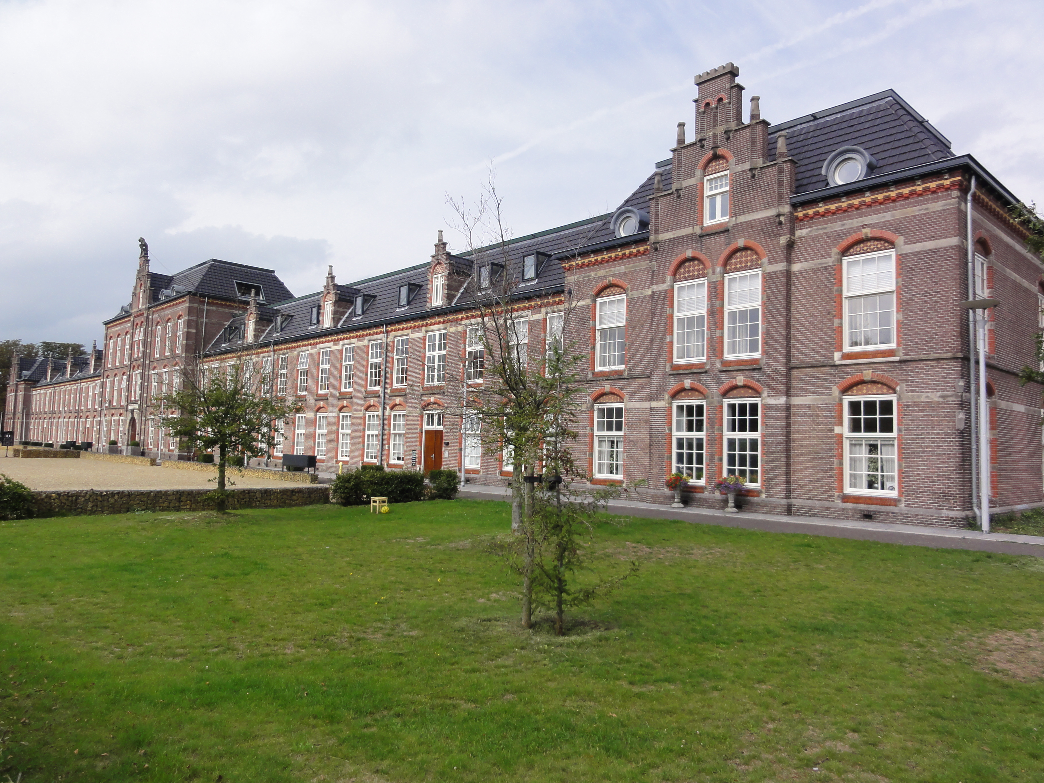 Nijmegen Rijksmonument Hoofdgebouw Snijderskazerne 08″ N, 5° 52′ 27.4″ E Object location51° 49′ 58.86″ N, 5° 52′ 41.56″ E